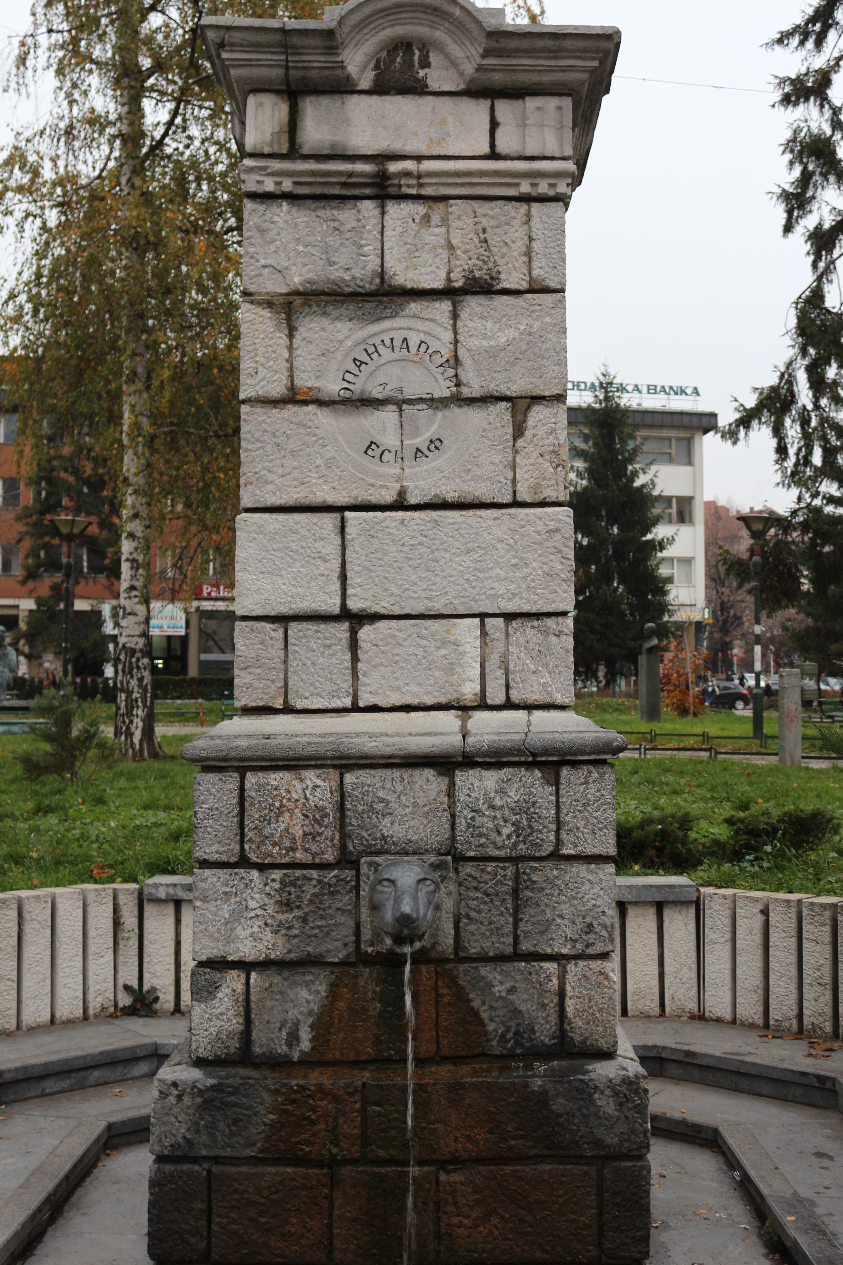 Opancarska cesma